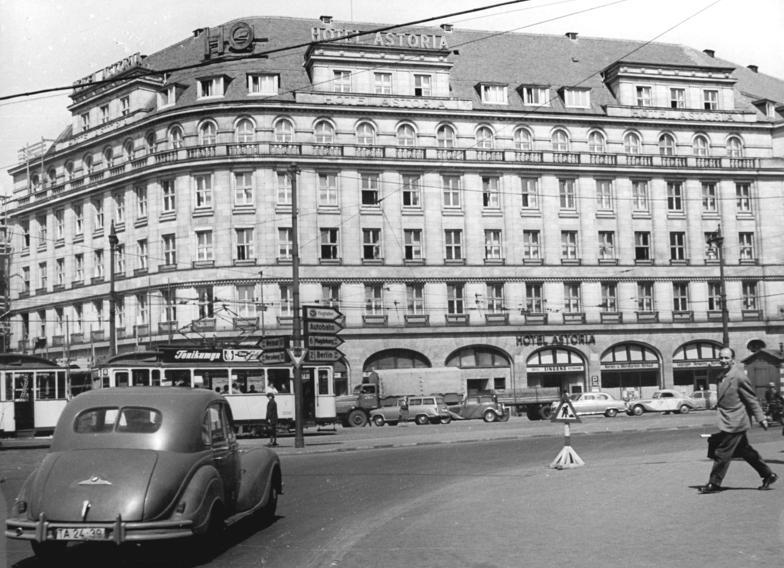 Leipzig, Hotel "Astoria" Zentralbild Benjack 18.6.57 Mehr als 9 Millionen DM Baukosten für das Messehotel "Astoria" in Leipzig Über ca. 200 Betten mehr als bisher wird das bekannte Hotel "Astoria" in Leipzig nach dem Bau der neuen Seitenflügel verfügen. Dieses Hotel war während des Krieges stark zerstört. UBz: Blick auf das Hotel "Astoria" in Leipzig. Bauherr des Astoria war der jüdische Frankfurter Bauunternehmer Karl Otto Cohn (Carl Ottokar Cohn), der seines Eigentums durch die sogenannte Arisierung in der Nazizeit beraubt wurde.